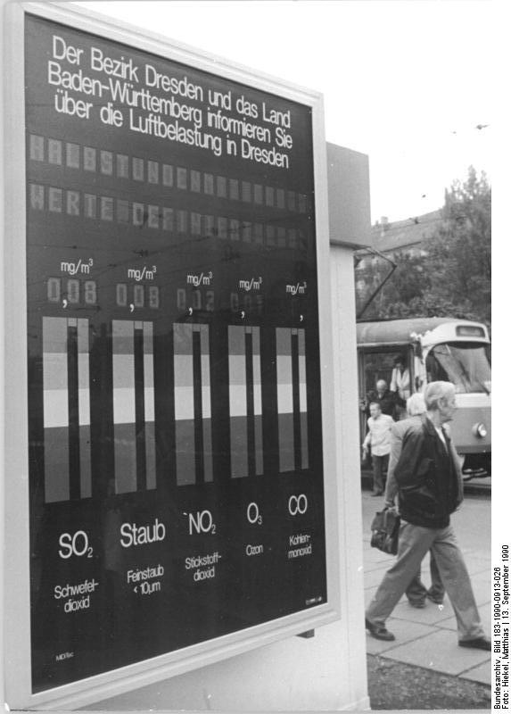 Dresden, Luftmessstation zur Smogbelastung ADN-Matthias Hiekel 13.9.90 Dresden: Dresdens erste Luftmeßstation, die automatisch rund um die Uhr die aktuellen Komponenten der Luftbelastung mißt und graphisch veranschaulicht, wurde der Stadt vom Partnerland Baden-Württemberg geschenkt. Mit dieser am Postplatz stehenden Tafel besitzt der Bezirk ein Netz von 15 dieser Stationen.